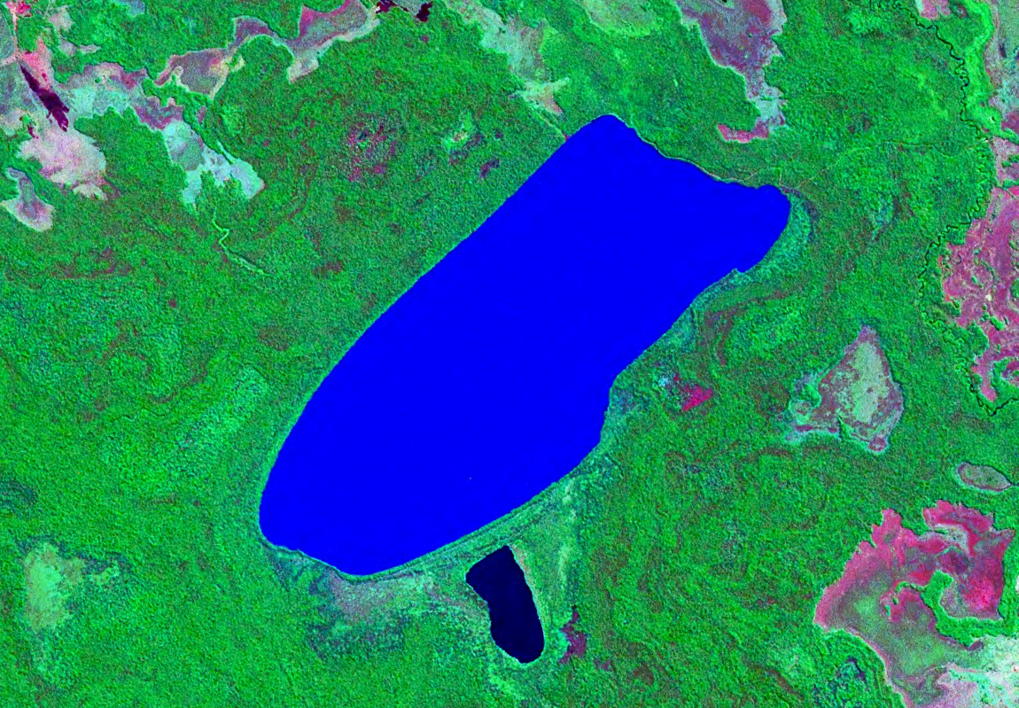 Vista satelital de la laguna San Jorde ubicada entre los departamentos bolivianos del Beni y Santa Cruz.